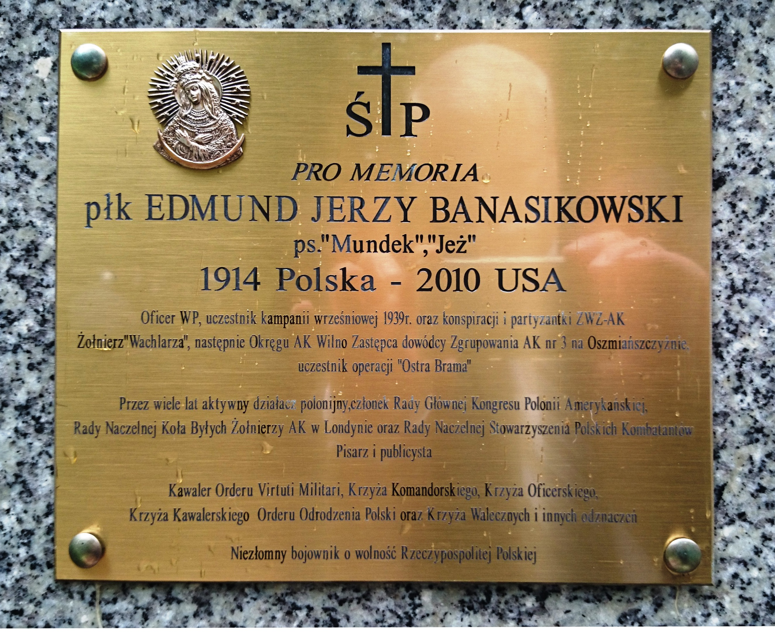 Tablica poświęcona płk. Edmundowi Banasikowskiemu w Panteonie Żołnierzy Polski Walczącej odsłonięta 25 lipca 2014 roku